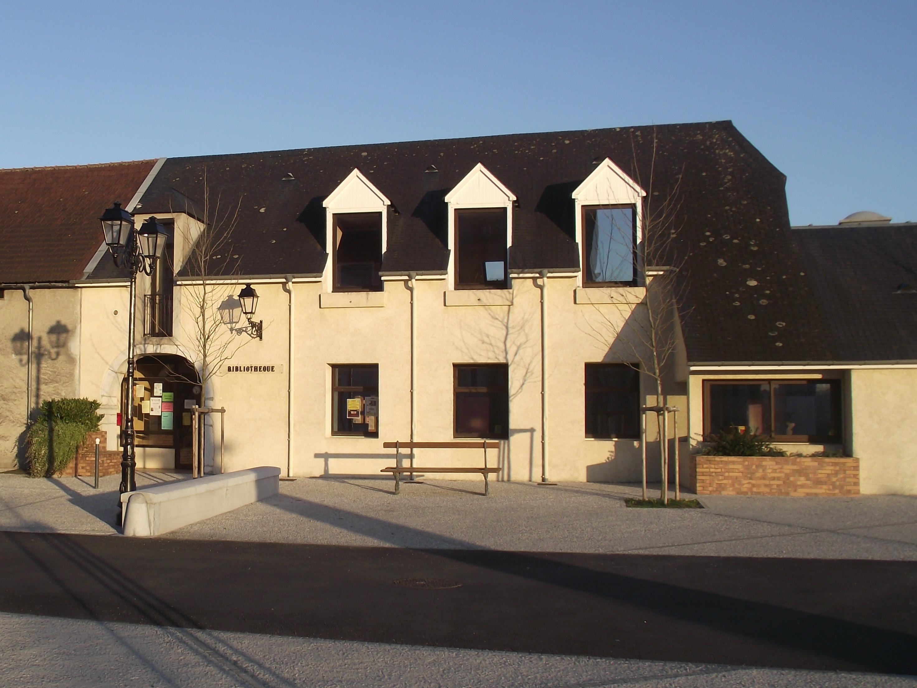 Bibliothèque de Coarraze (Pyrénées-Atlantiques, France)